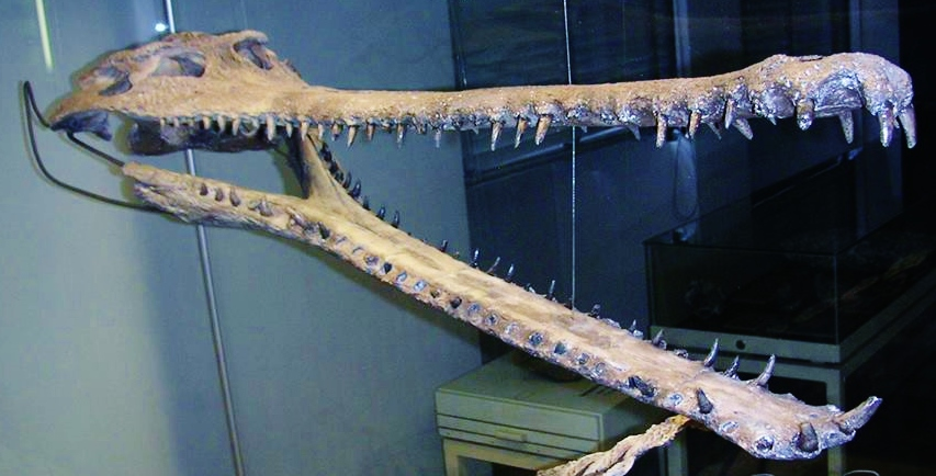 Fossil of Piscogavialis, an extinct reptile - Museum of Natural History Karlsruhe